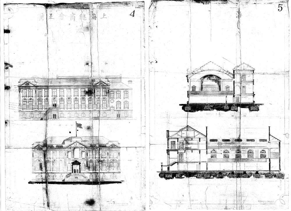 中文（香港）: 上海总商会立面图和剖面图